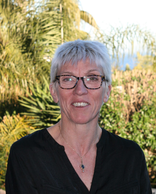 Caroline Roose, le 8 Mars 2019